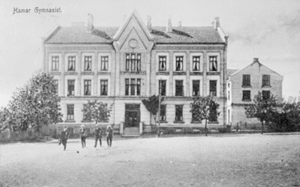 Hamar katedralskole ved Vestre torg